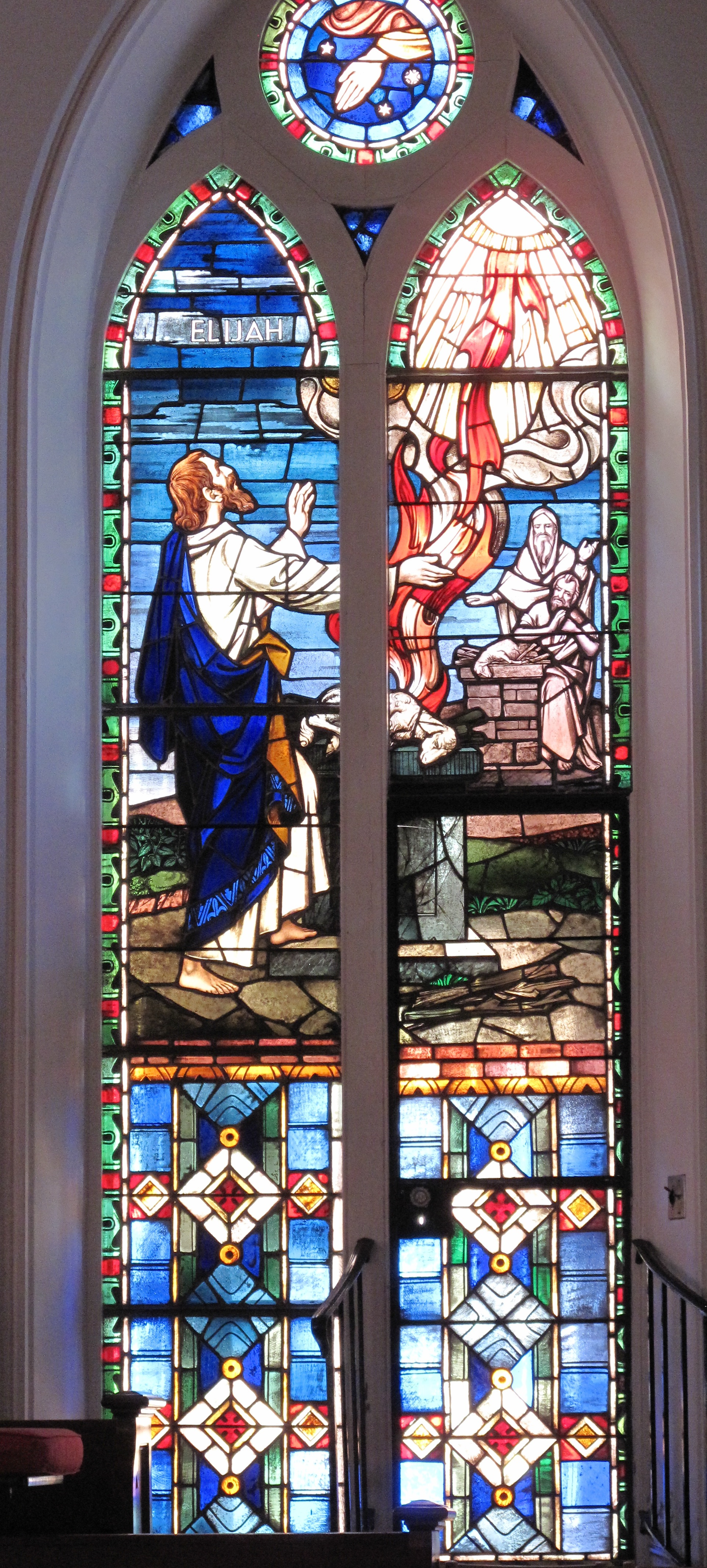 Elijah window